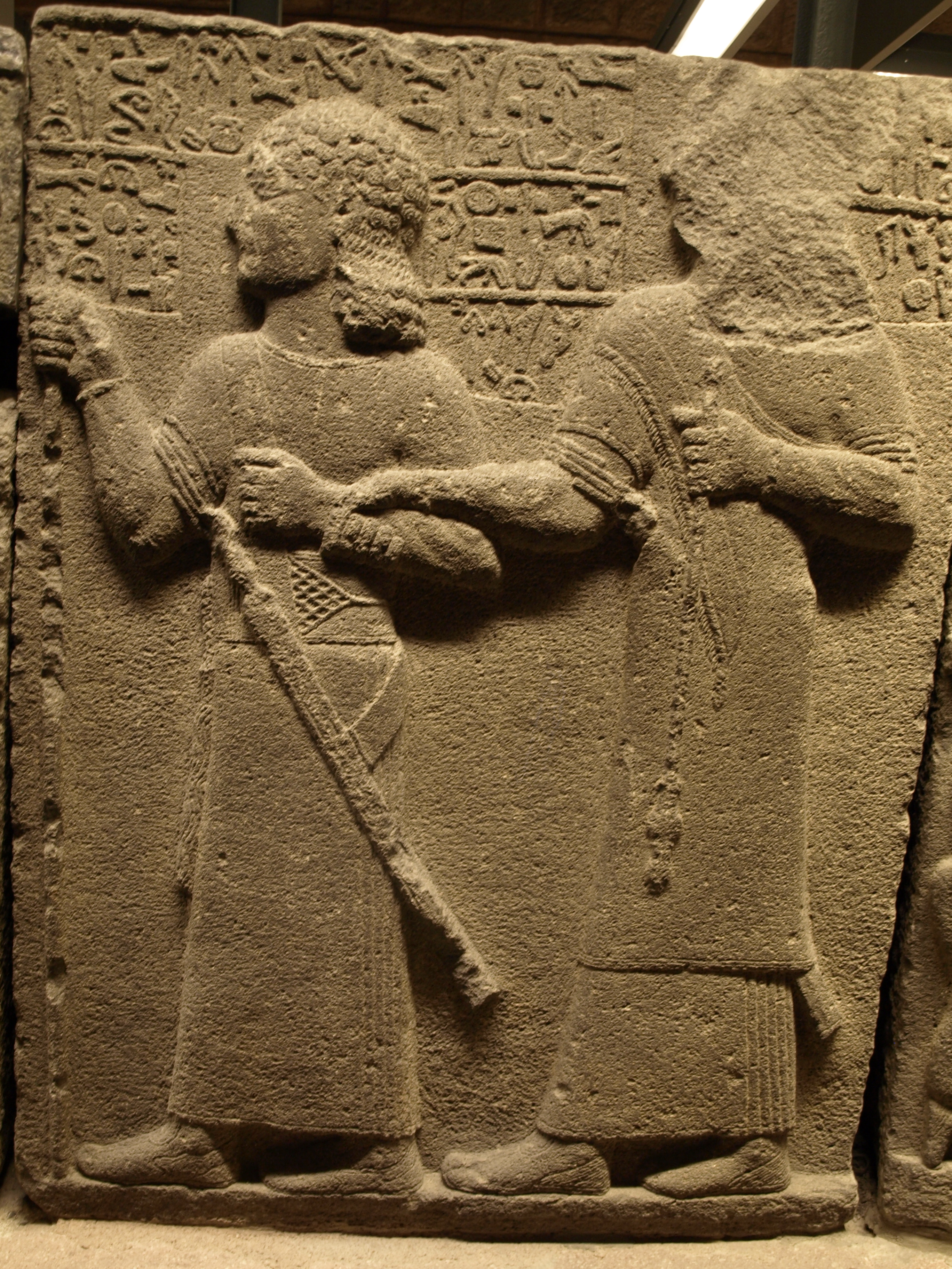 Relief von Yariri und Kamani (Karkemiš)